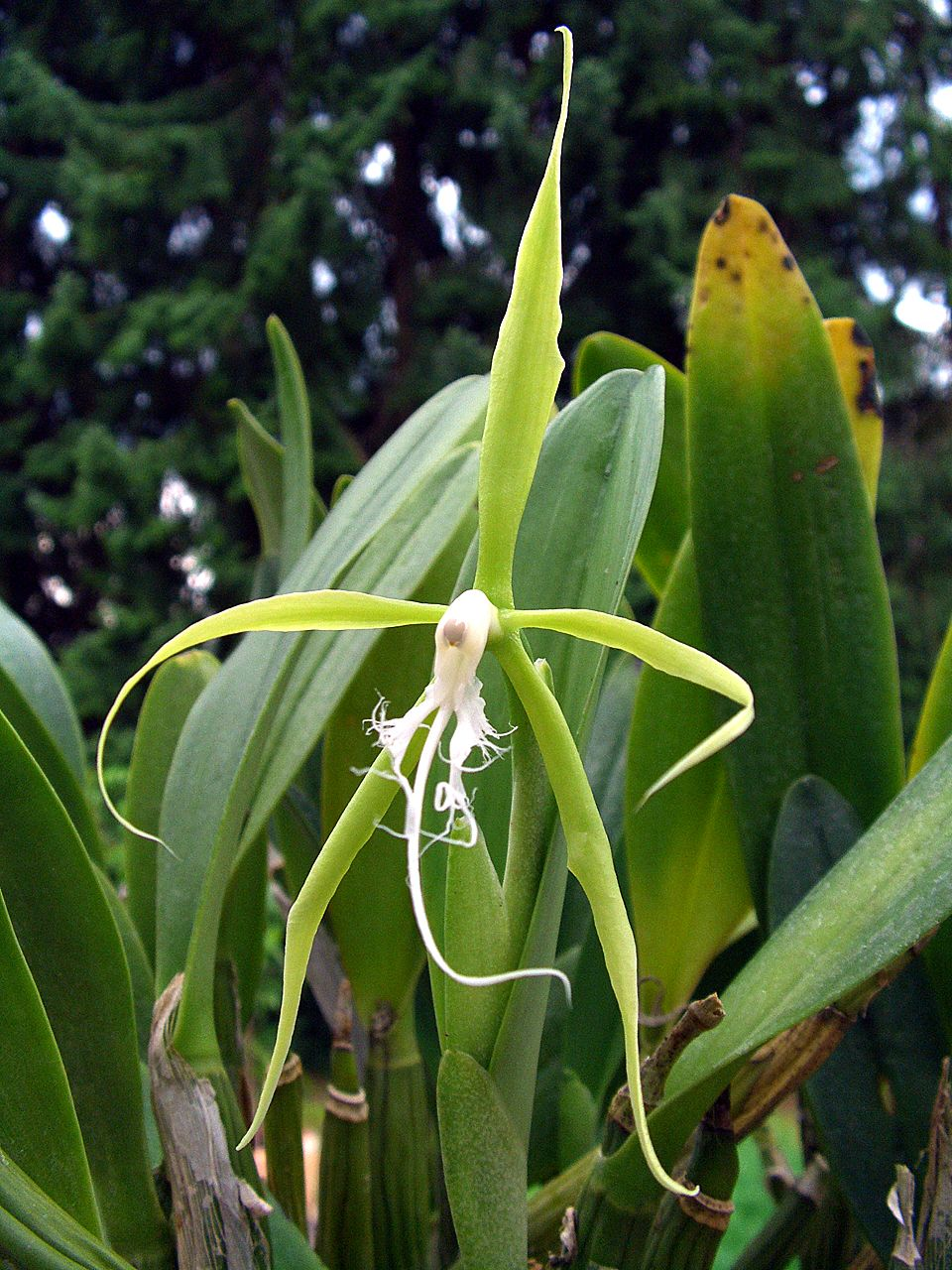 Epidendrum ciliare - flower